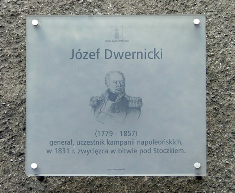 PL, Warsaw, Poland, Praga Południe, Dwernickiego Street